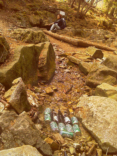 Source du Lambro-Lombardie-Italie